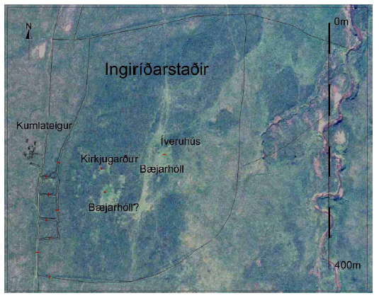 Kumlateigurinn og svæðið